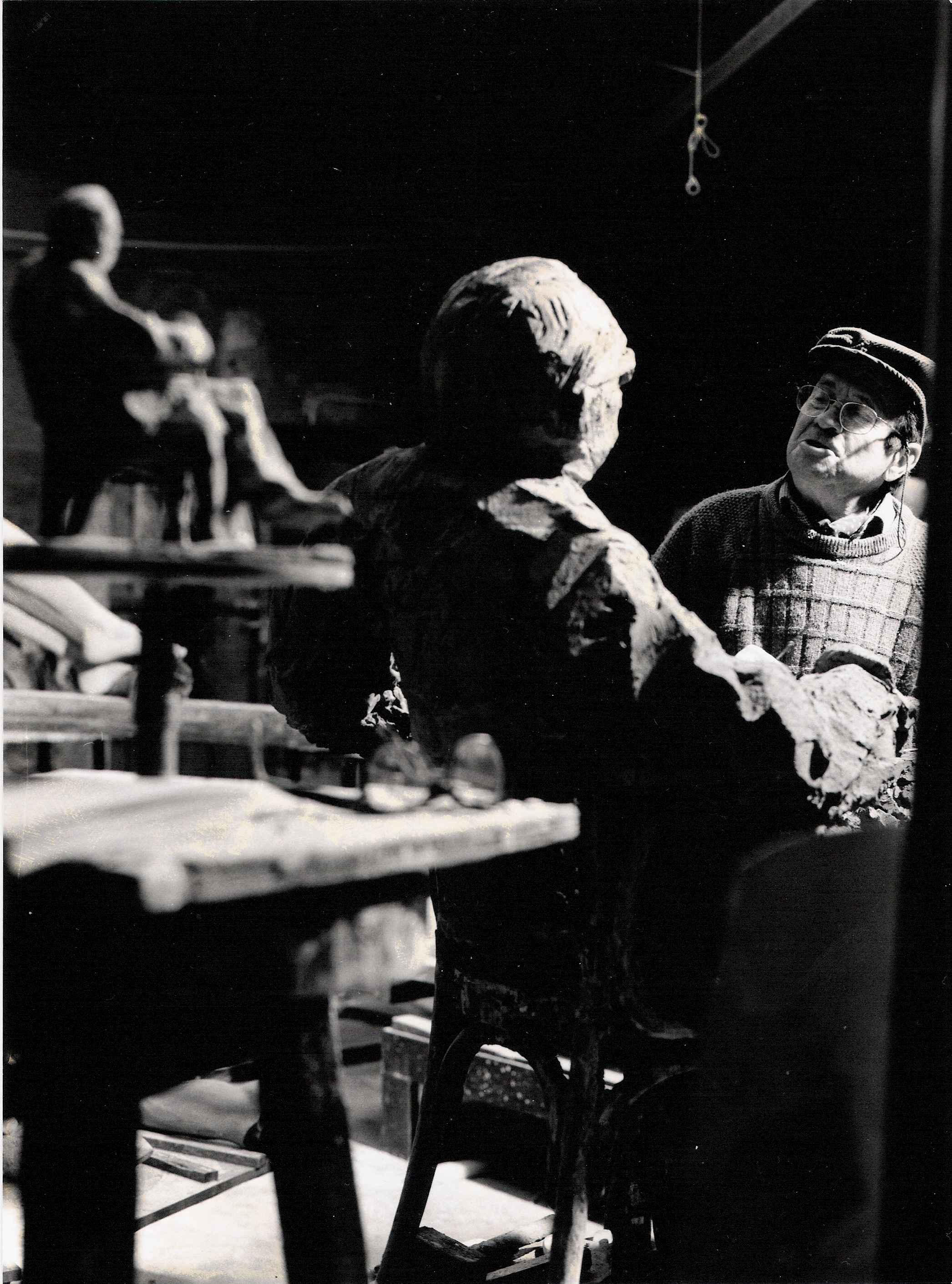 El escultor Fernando Mayoral, (hablando con su obra) durante la creación de la escultura en memoria a Torrente Ballester, desde el año 2000 situada en el Café Novelty de la Plaza Mayor de Salamanca. En primer plano y desenfocada, se ve el boceto inicial de la escultura.